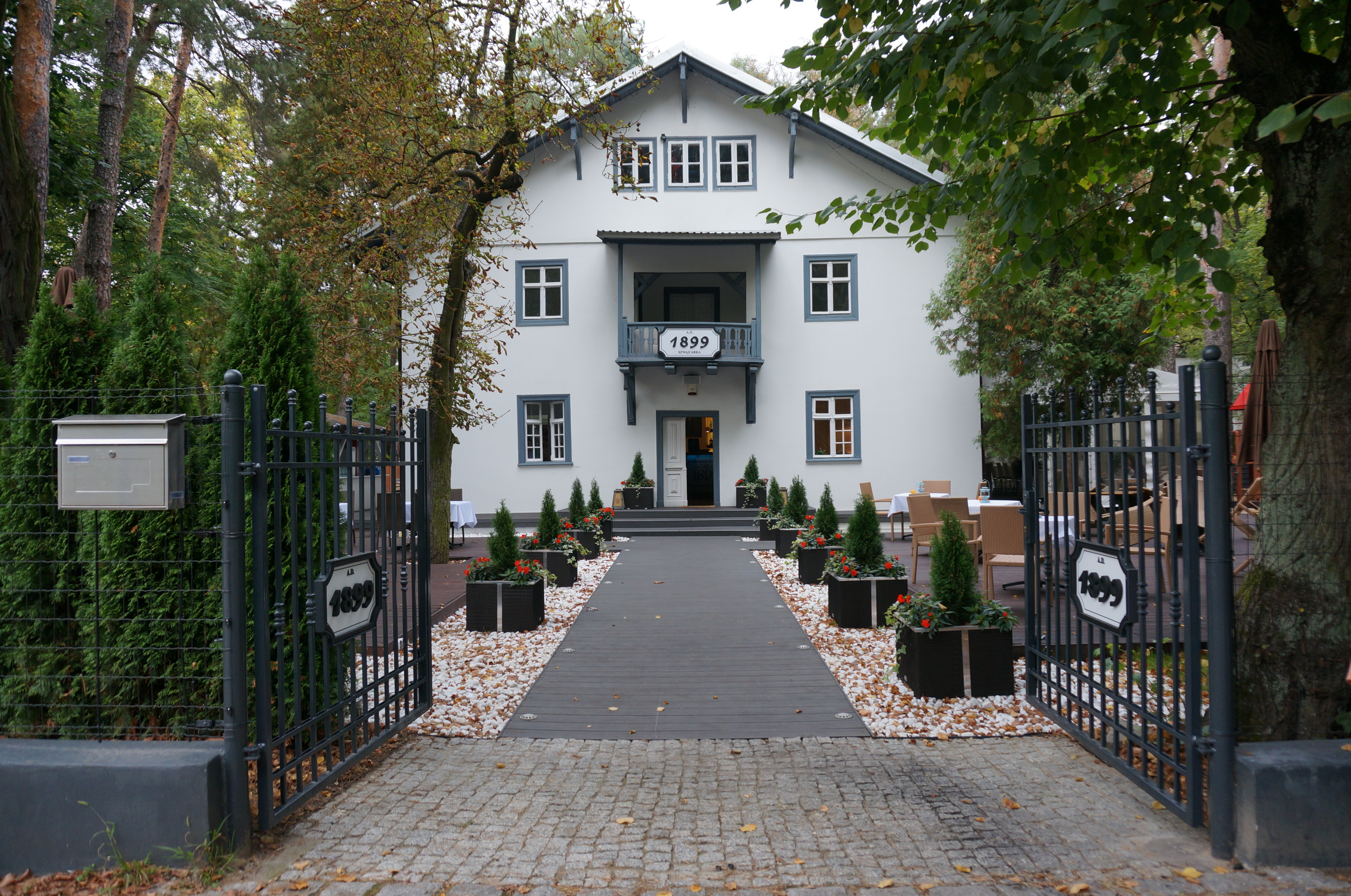 Konstancin-Jeziorna, zespół willi SZWAJCARKA, ok. 1900